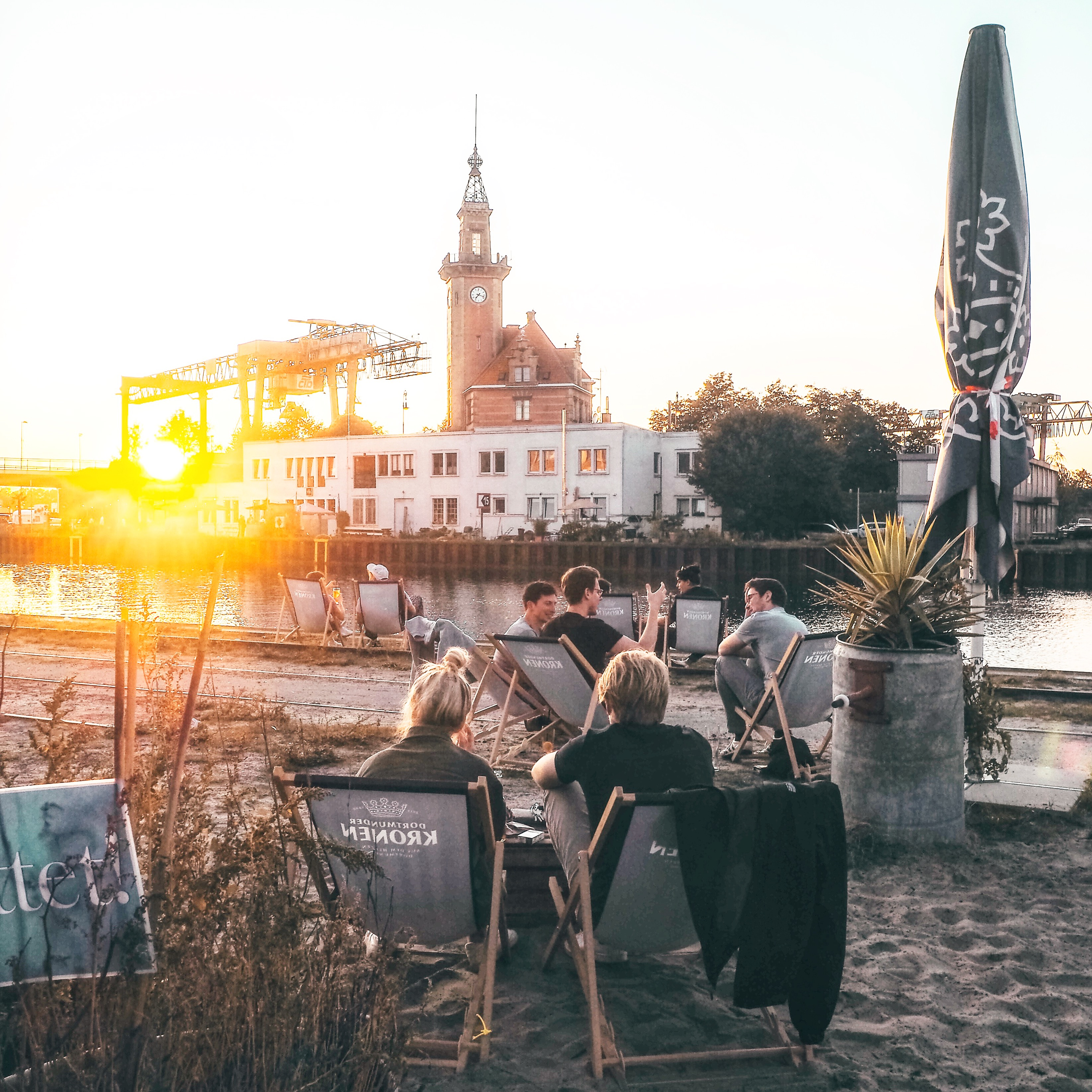 Hafenpromenade an der Speicherstraße